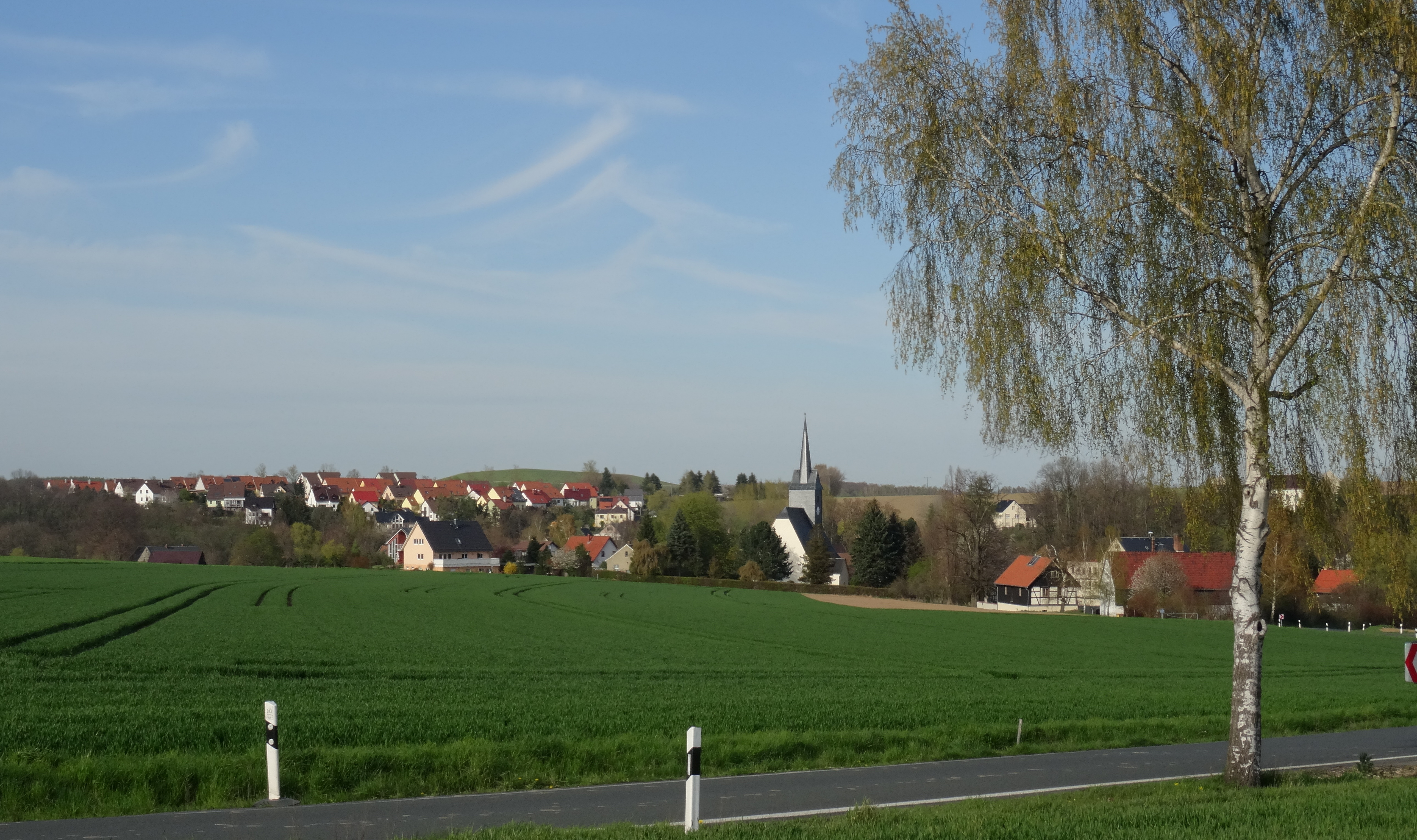 Teilansicht von Königswalde